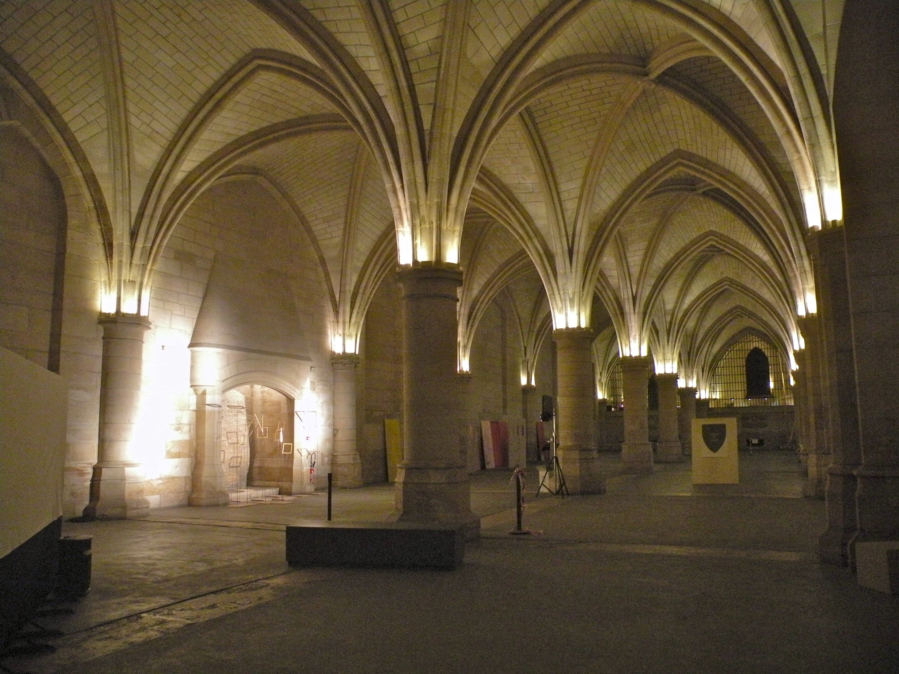 Conciergerie - Salle des gens d'armes